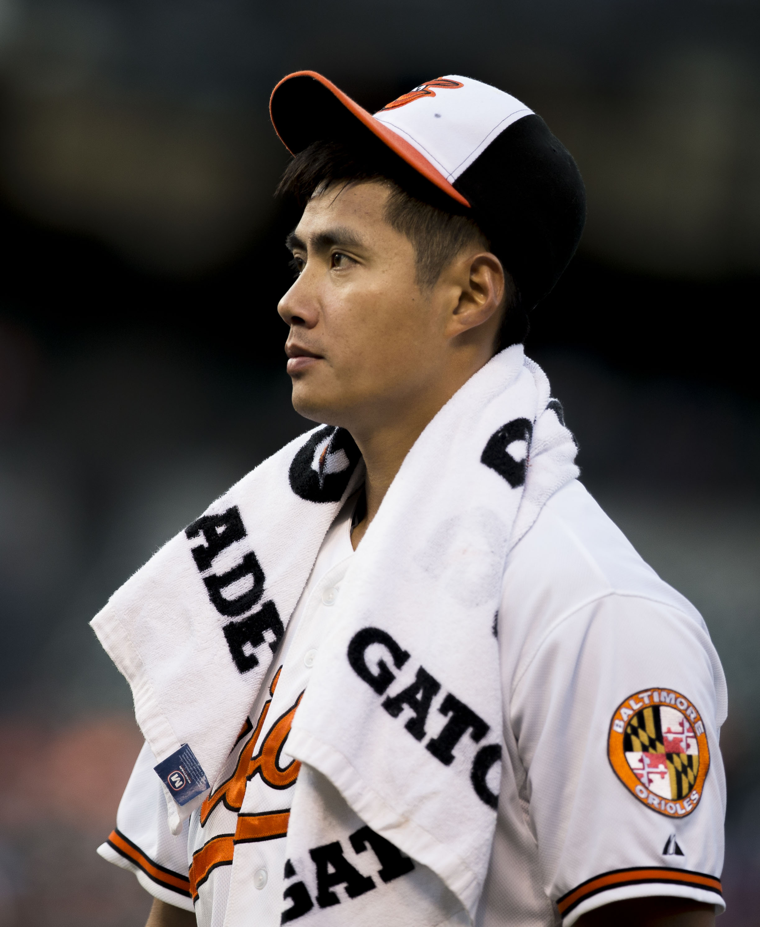 Yankees at Orioles 04/13/15